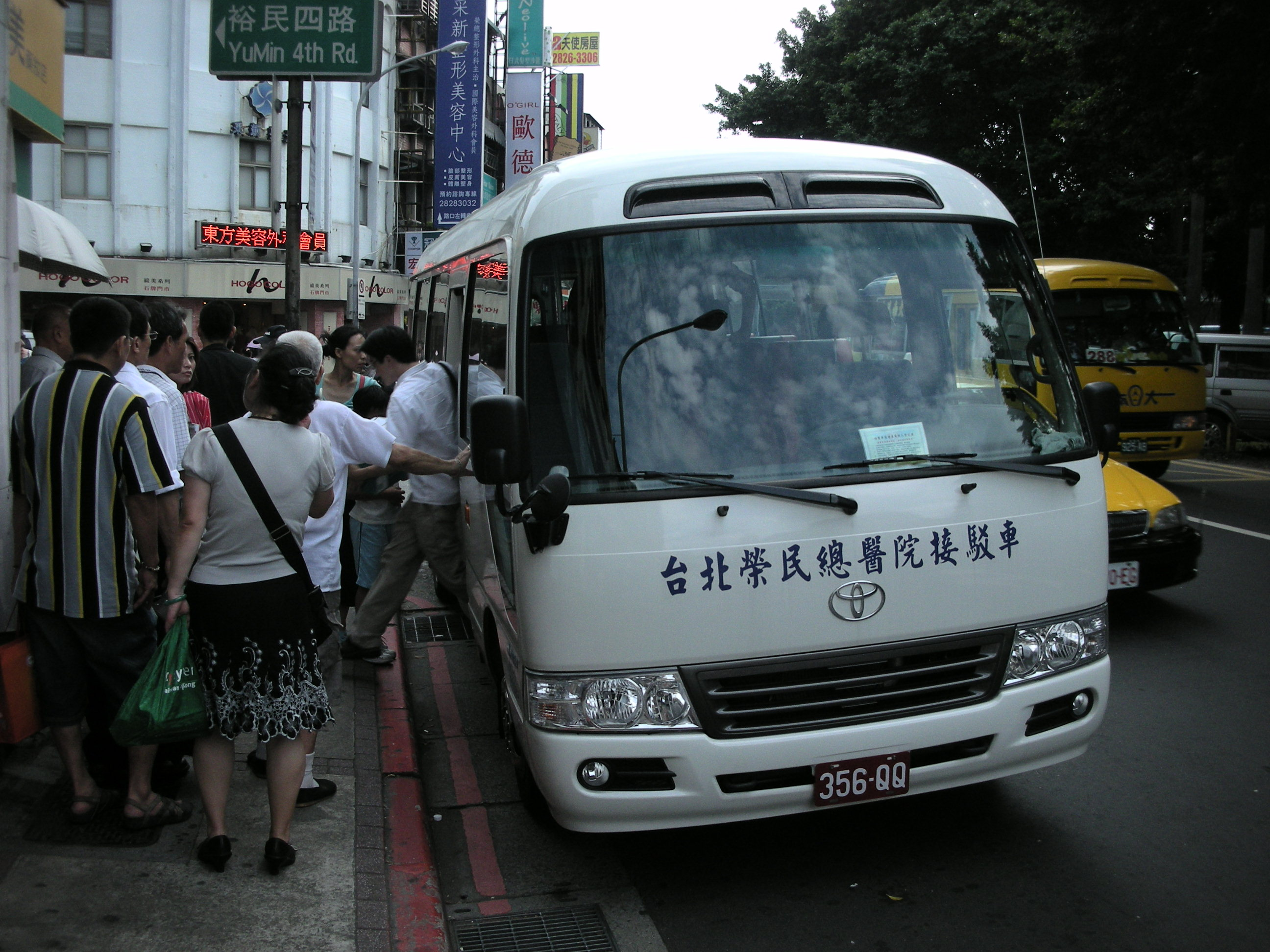 中文（台灣）: 台北榮民總醫院接駁車356-QQ(石牌路與裕民四路口公車站牌處)